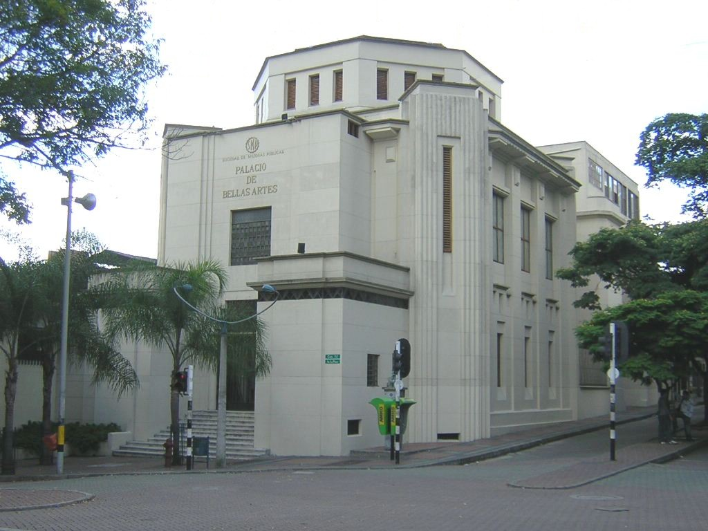 Palacio de Bellas Artes, entre la Avenida La Playa y Carrera Córdoba Medellín, Colombia.